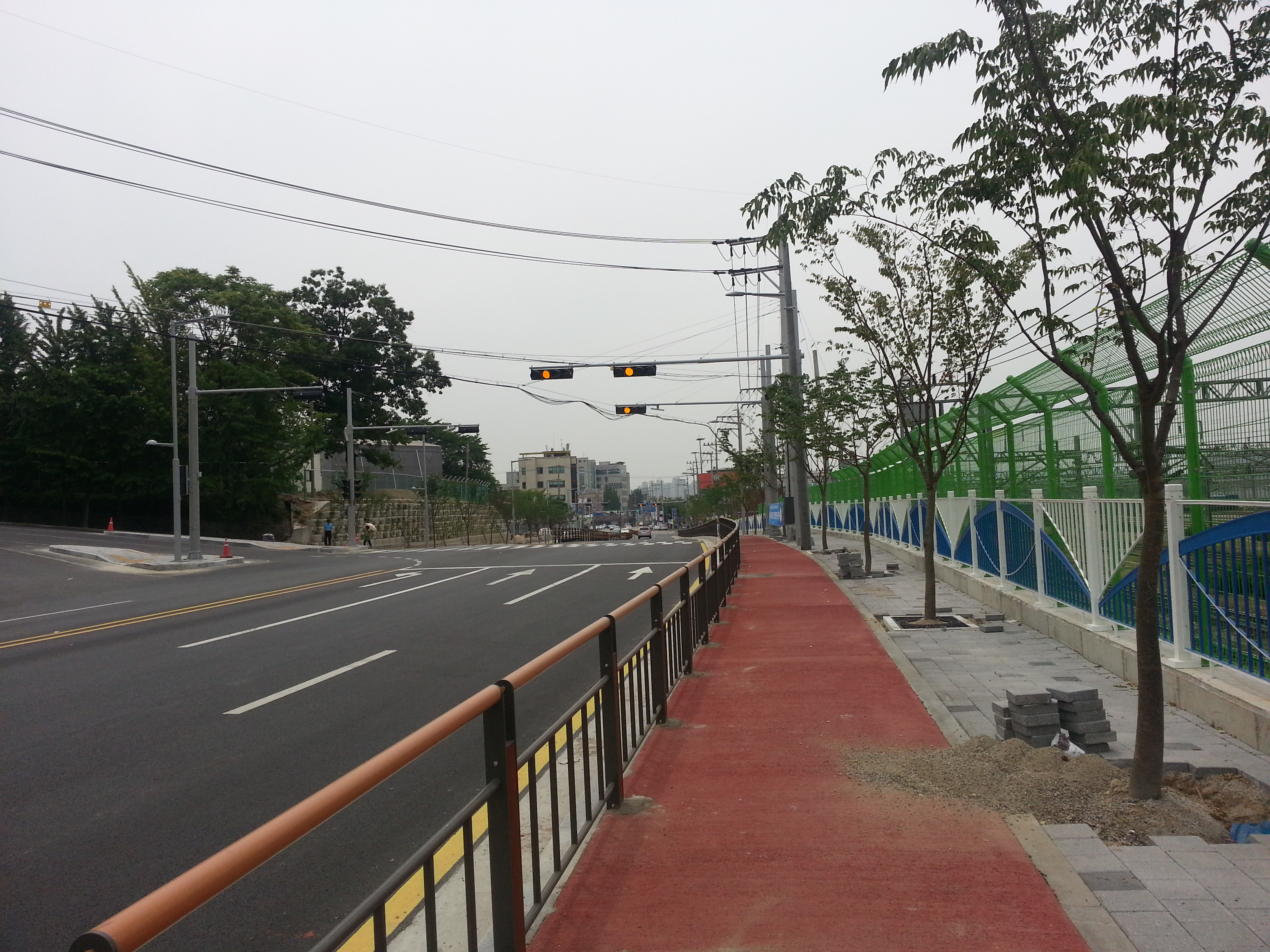 의왕시도 1호선 (철도박물관로), 현대자동차 연구소 인근